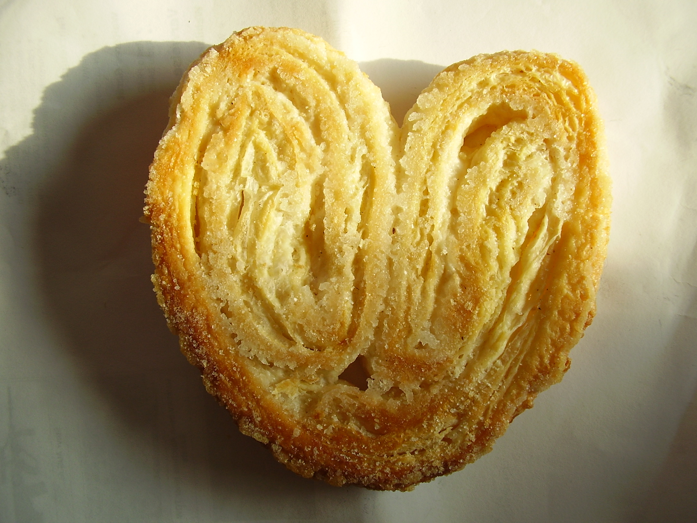 Schweineohr ohne Schokolade